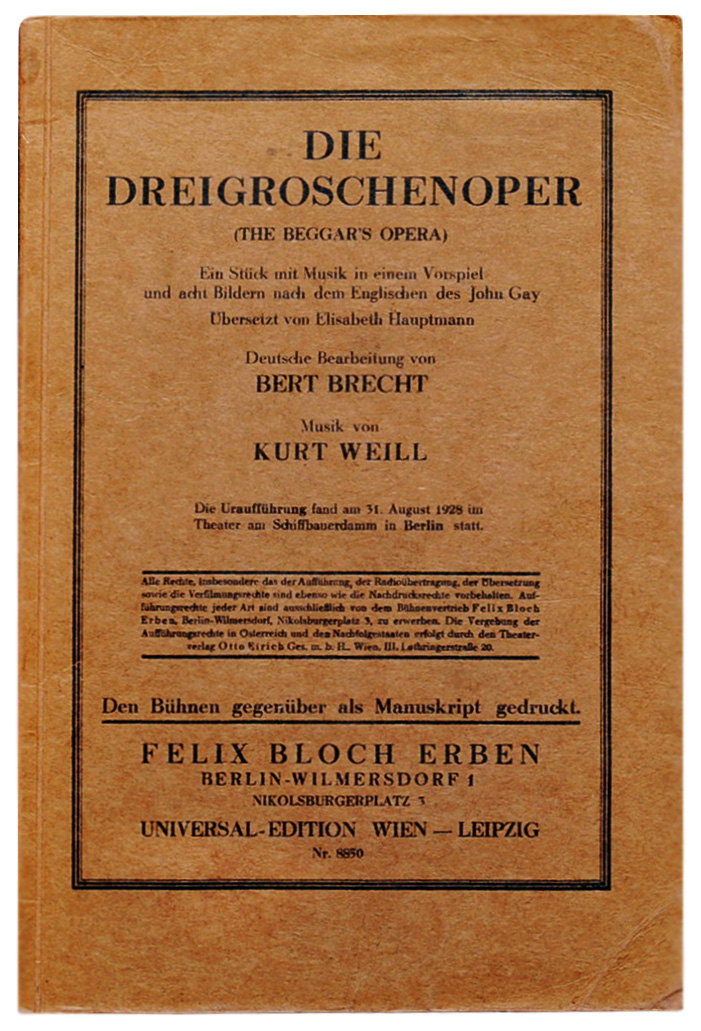 Brecht, Bertolt: Die Dreigroschenoper (The Beggar's Opera). Ein Stück mit Musik in einem Vorspiel und acht Bildern nach dem Englischen des John Gay. Übersetzt von Elisabeth Hauptmann. Deutsche Bearbeitung von Bert Brecht. Musik von Kurt Weil. Die Uraufführung fand am 31. August 1928 im Theater am Schiffbauerdamm in Berlin statt. Den Bühnen gegenüber als Manuskript gedruckt. Wien: Universal-Edition A. G. 1928, 80 Seiten, Erstdruck (Wilpert/Gühring² 12). Original-Karton mit typographisch gestaltetem Deckblatt 23 x 15 cm.